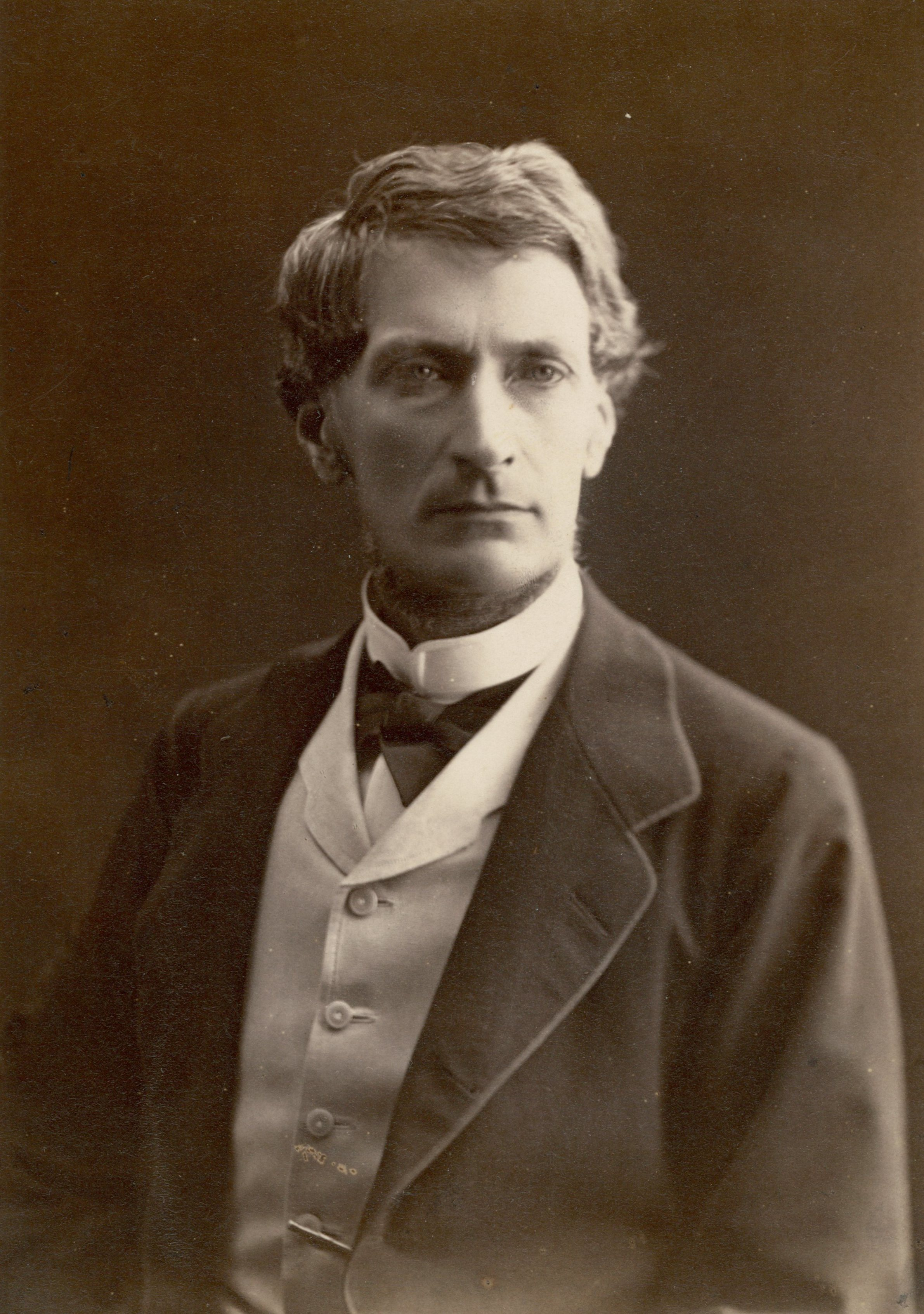 Alfred Józef Potocki, [non ante 1867]